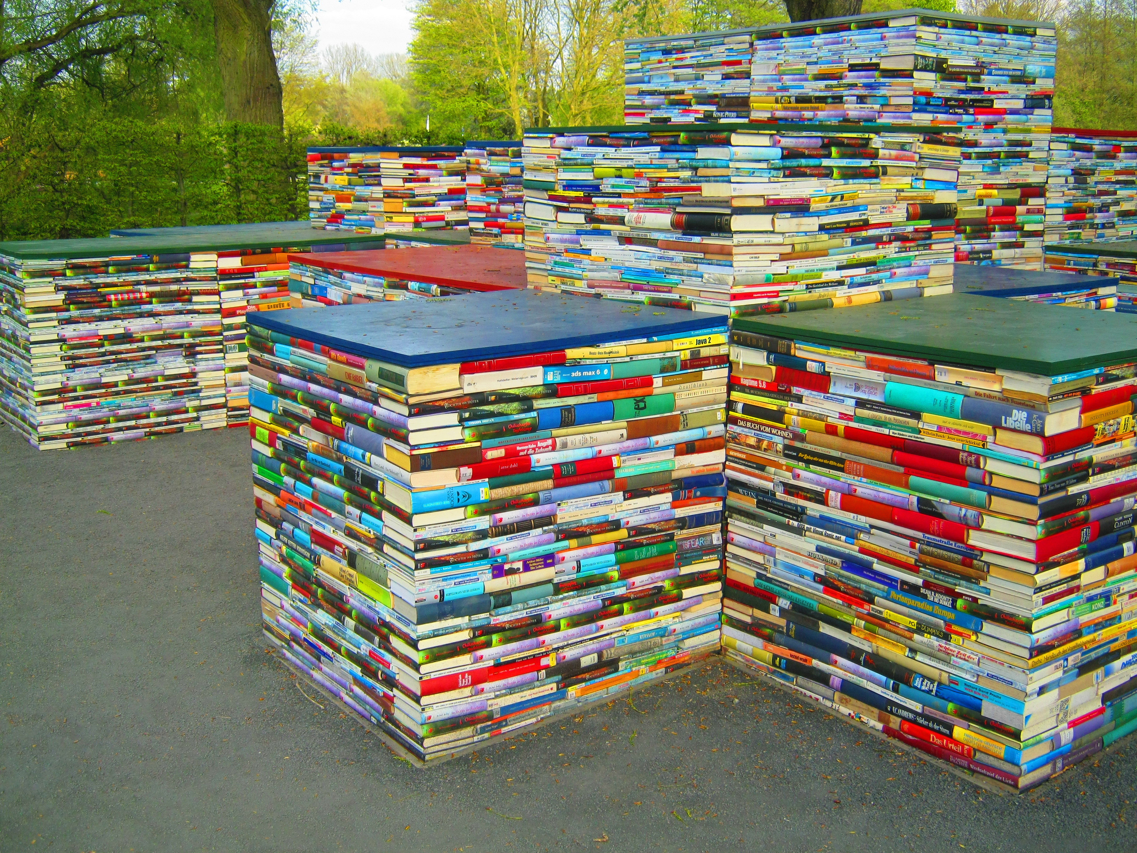 "Vers um Vers" Bücherturm in der "Welt der Kulturen" der Internationalen Gartenschau Hamburg 2013.